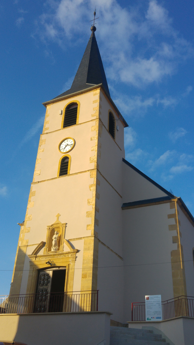 Photo de l'église d'Oudrenne